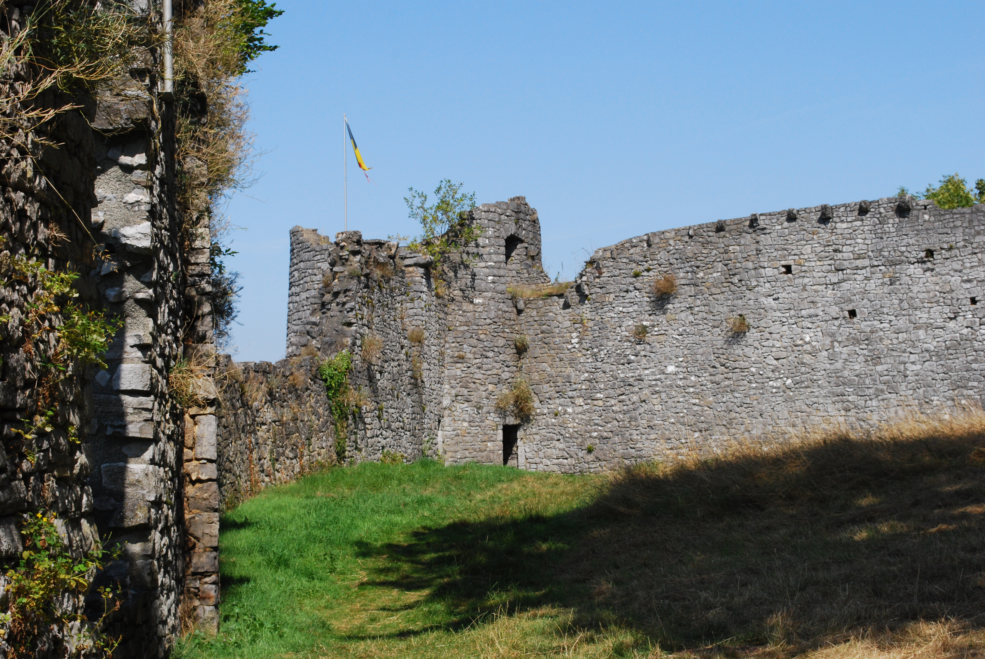 Ruines du château de Poilvache (Belgique, Yvoir).